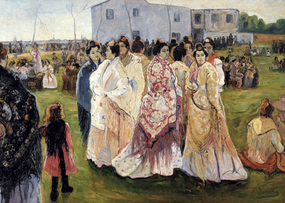 Varias mujeres con mantón de Manila durante una fiesta campera.